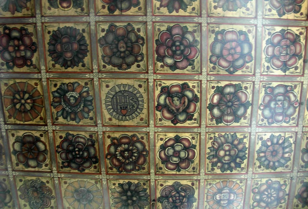 XVII-wieczna polichromia na suficie nawy w kościele klarysek